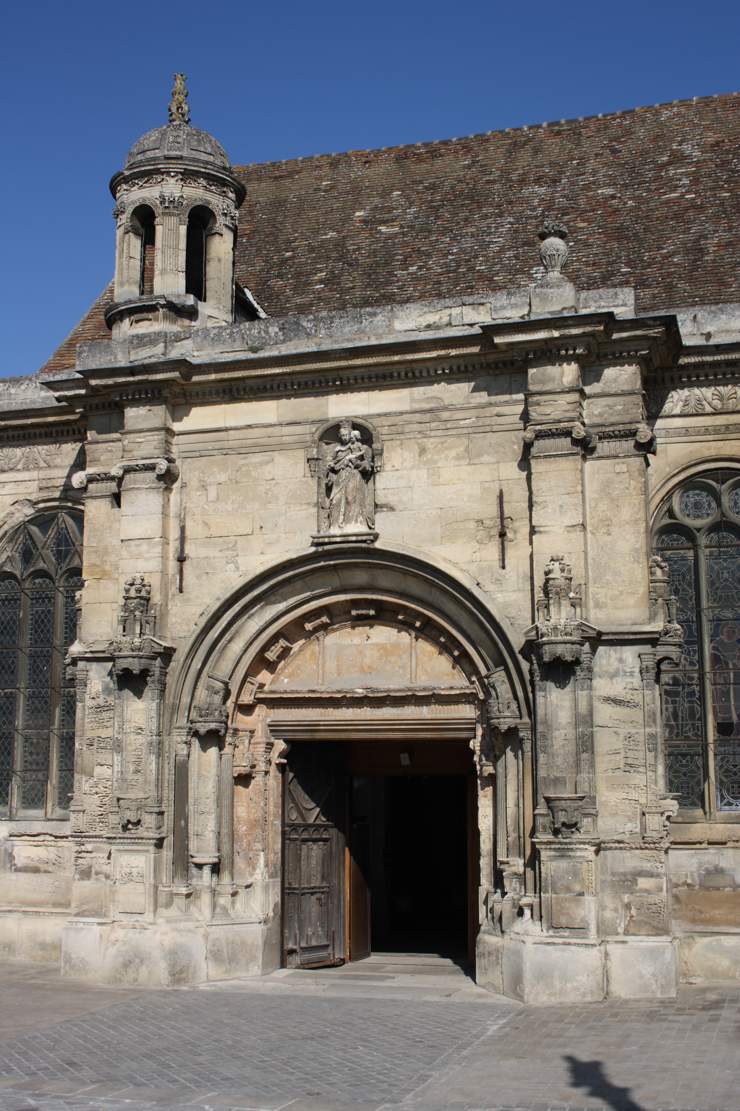 Renaissancefassade der Kirche Notre-Dame-de-la-Nativité in Magny-en-Vexin